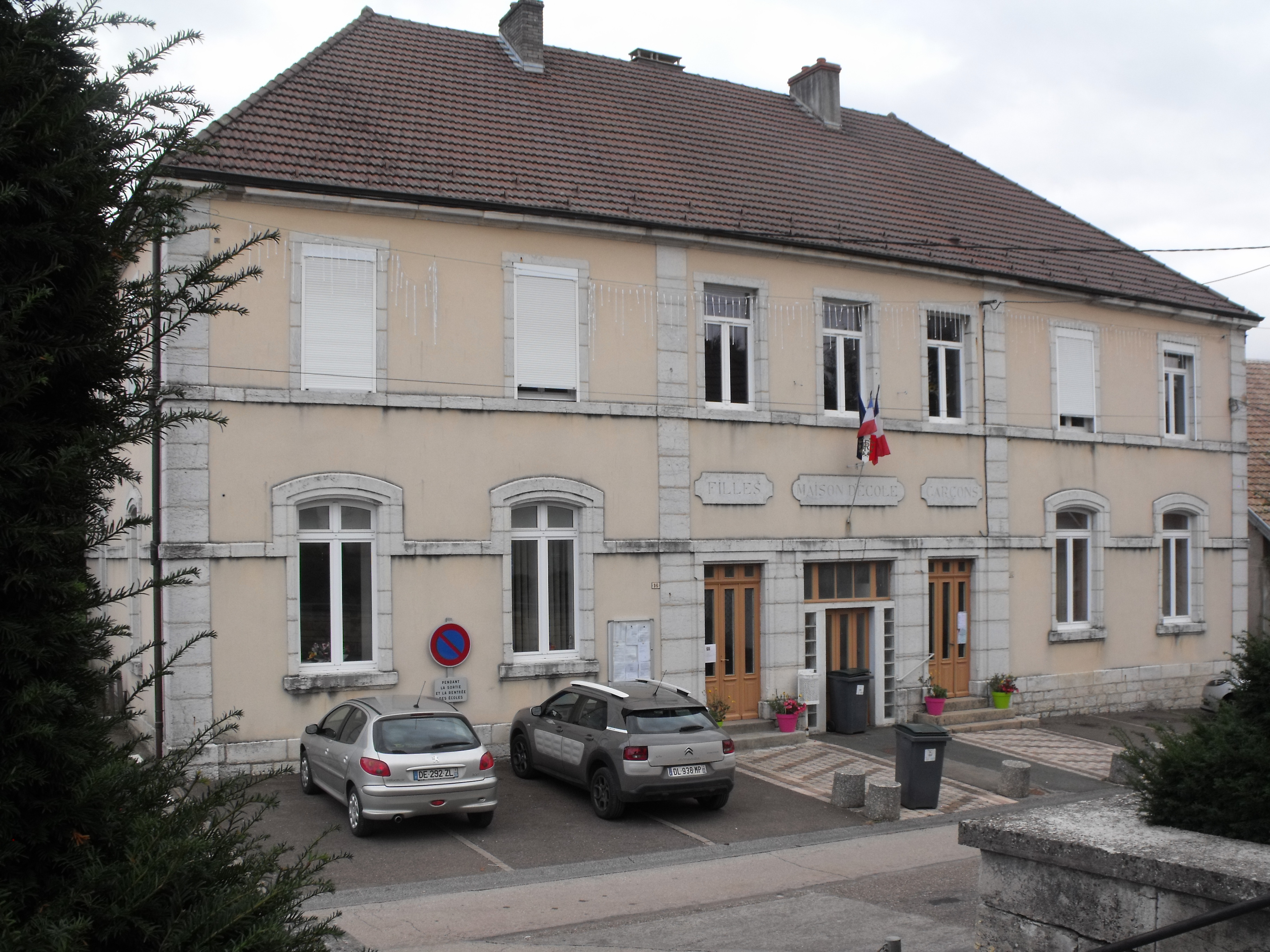 Mairie de Fontaine-lès-Clerval, Doubs, France